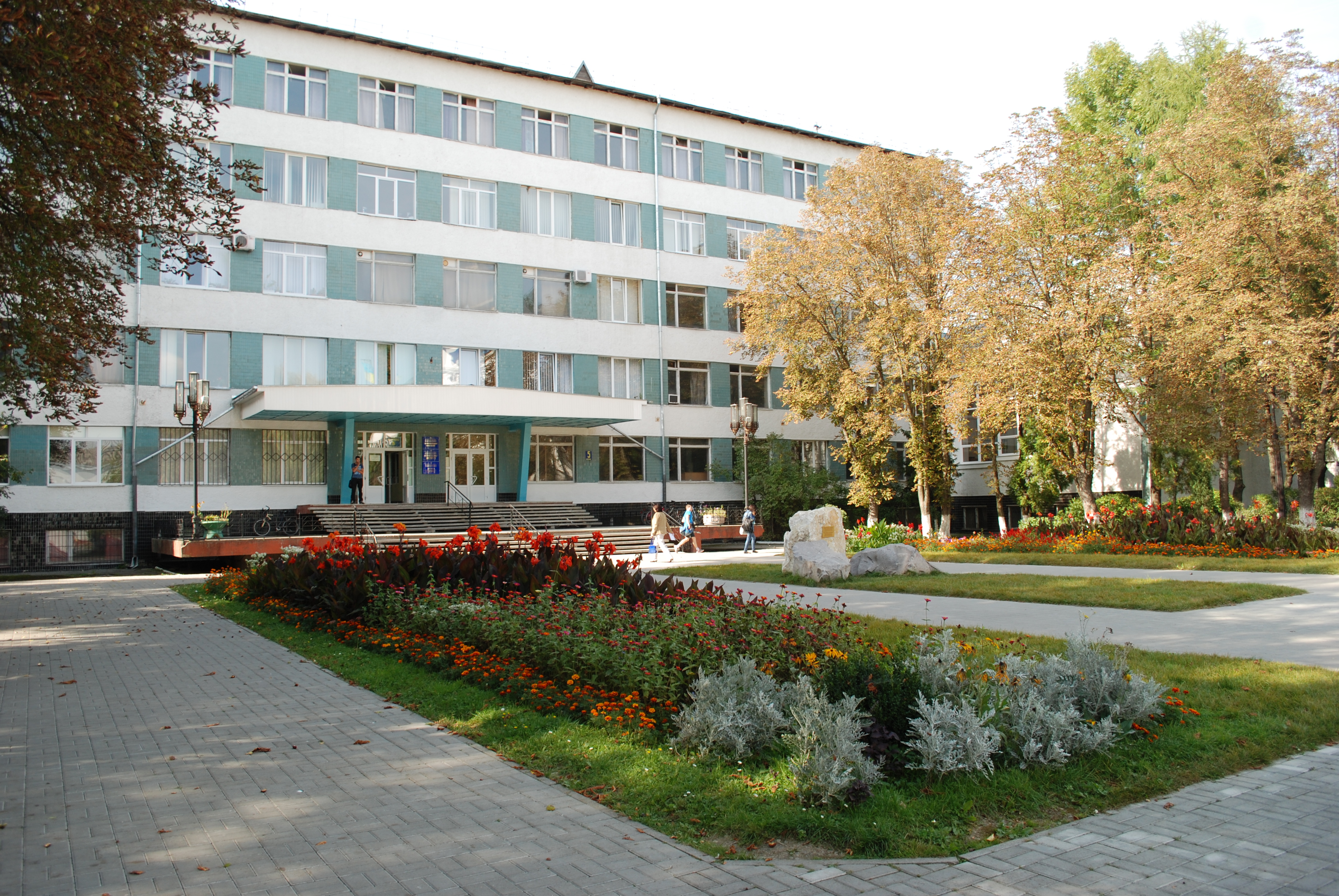 фасад 5 корпусу